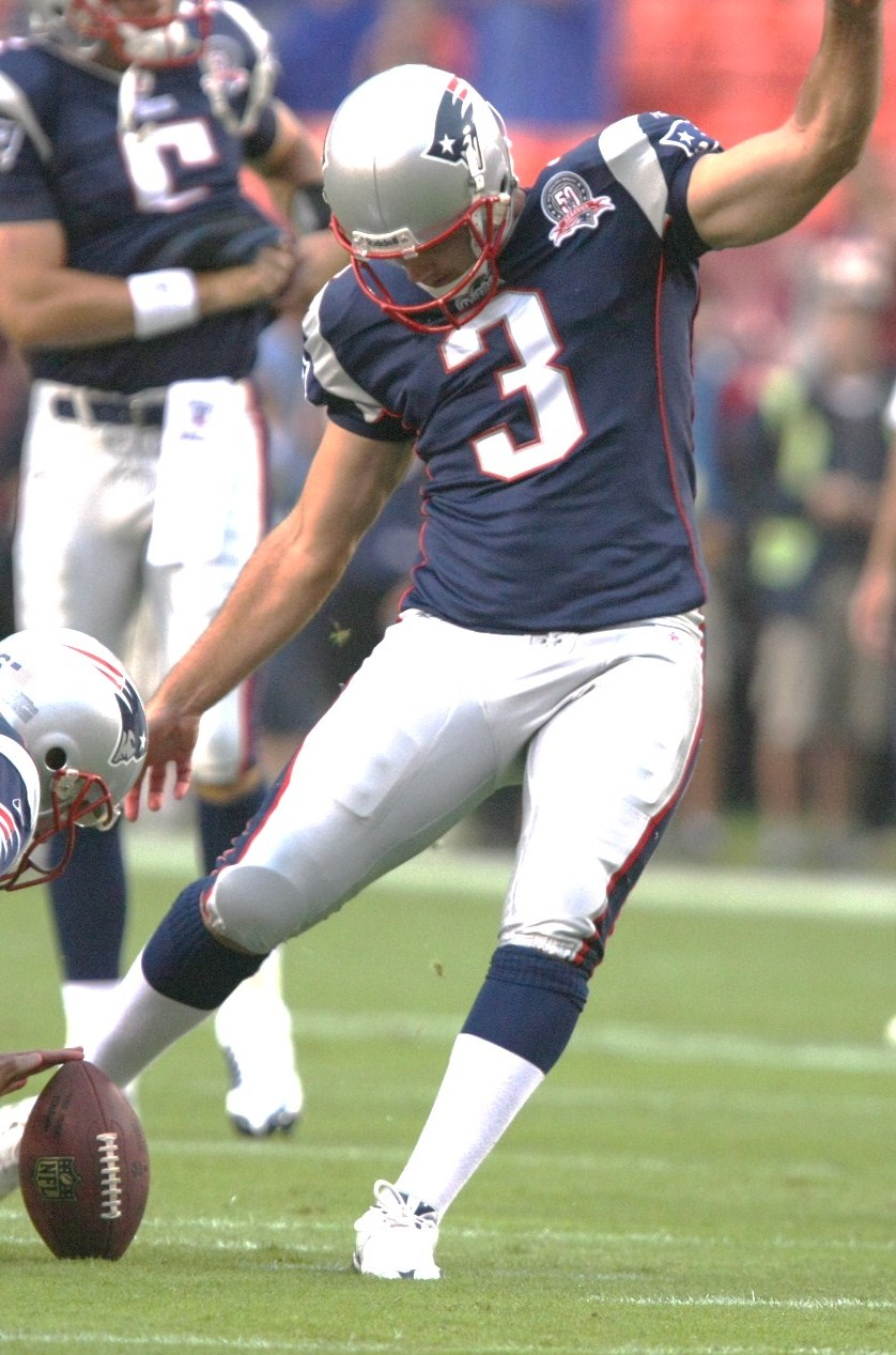 Stephen Gostkowski